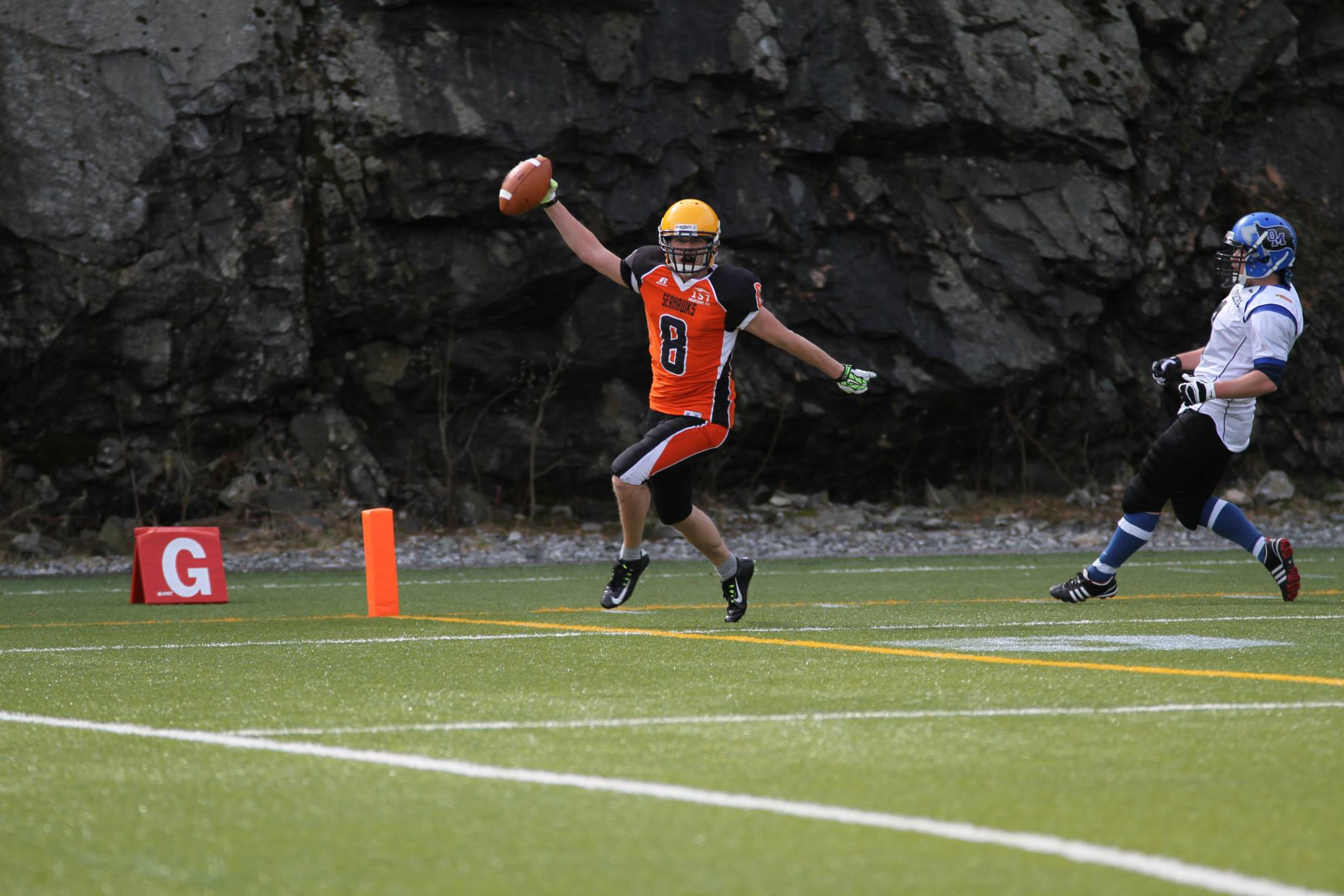 Åsane Quarterback, Alexander Moberg scorer touchdown